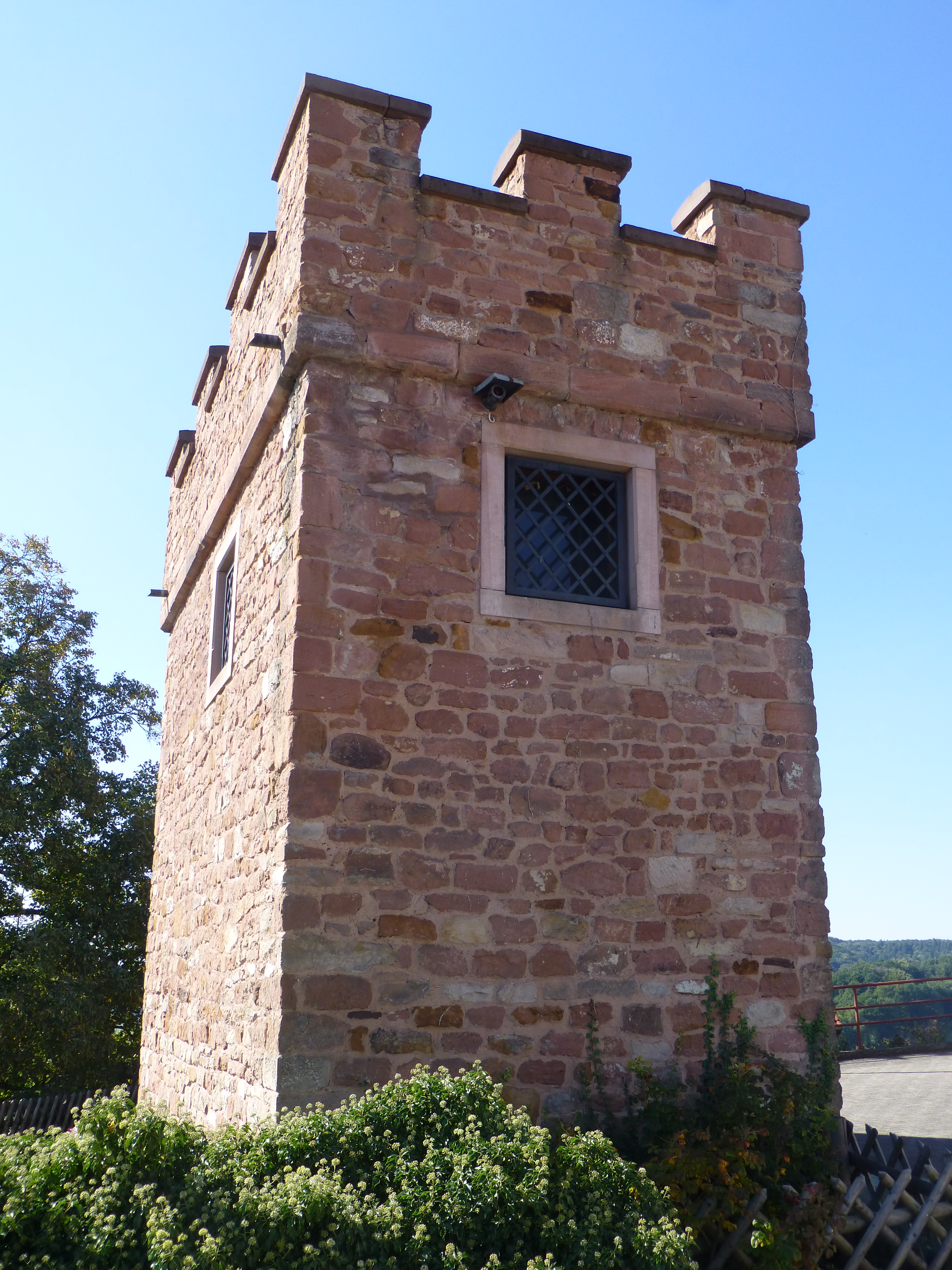 Der Glockenturm in Stauf, Nordostseite des Turms